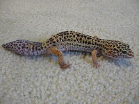 Cria_d'un_drago